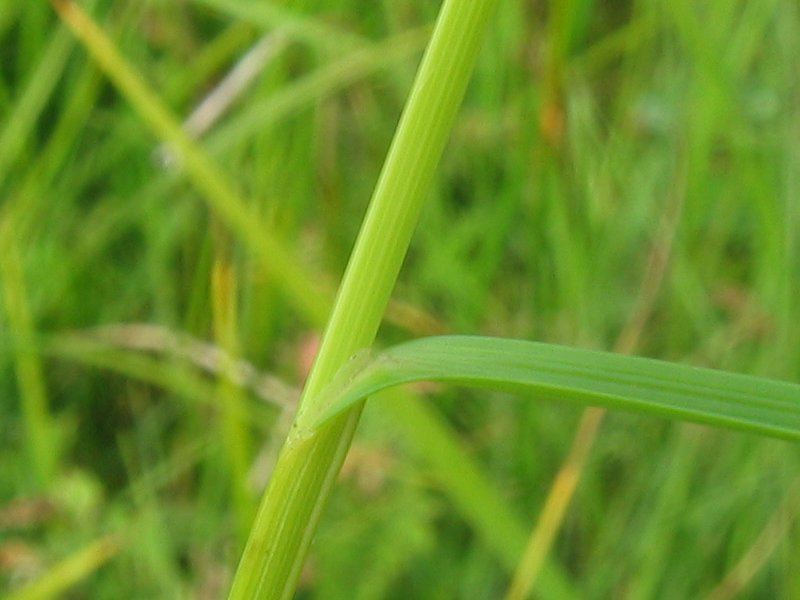 Blatthäutchen der Zweizeiligen Segge Carex disticha, Warnow-Wiesen bei Rostock